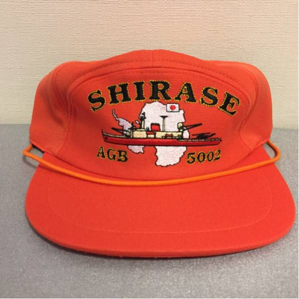 初代しらせ部隊識別帽